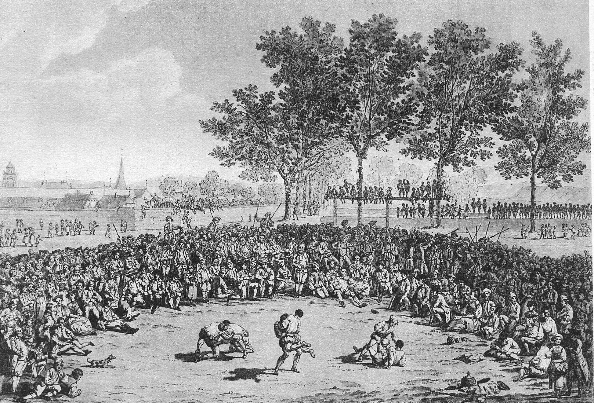 Ostermontagsschwingfest auf der Grossen Schanze in Bern um 1775, Farbstich von Marquard Wocher